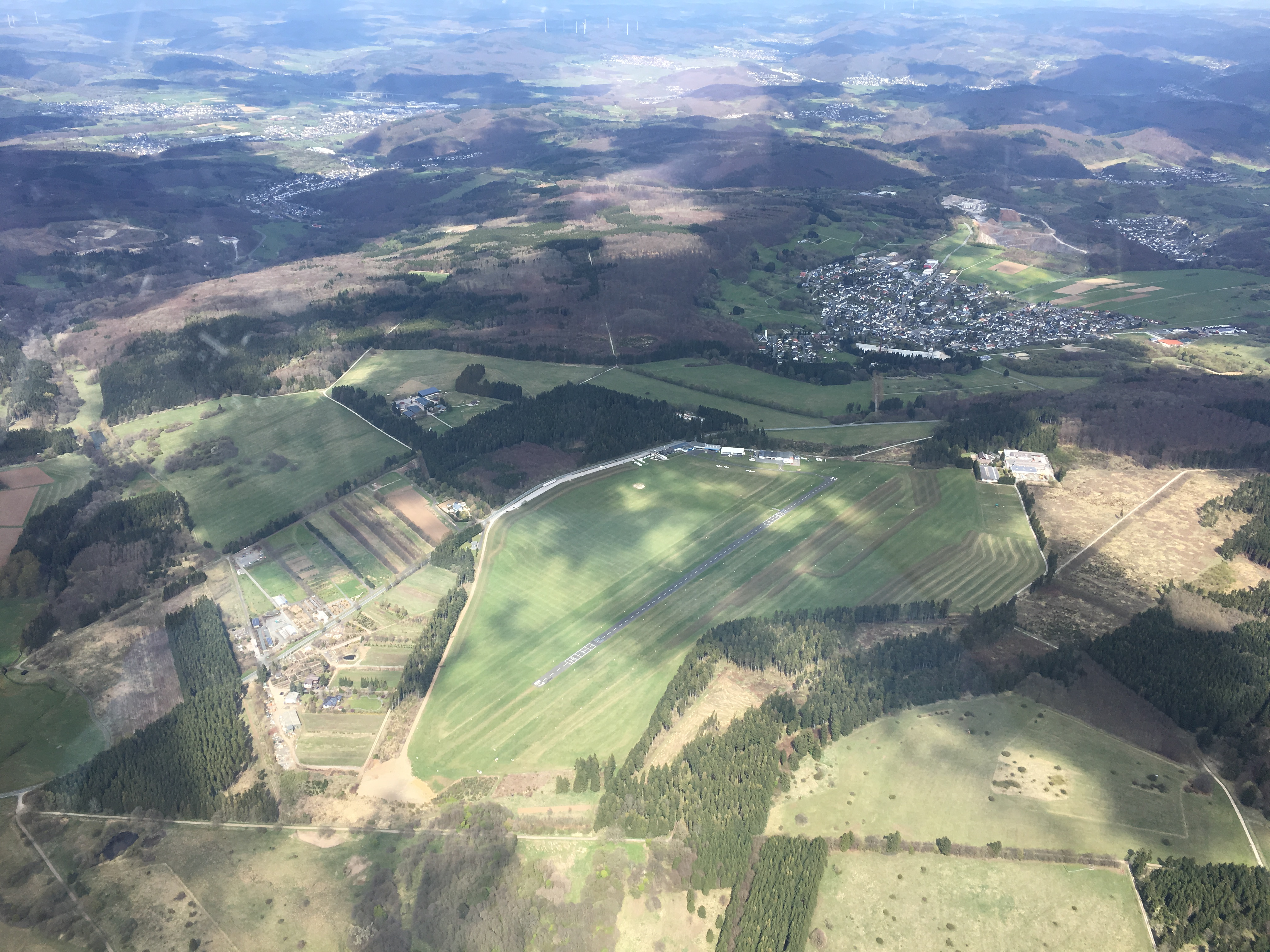 Luftaufnahme des Verkehrslandeplatzes Breitscheid